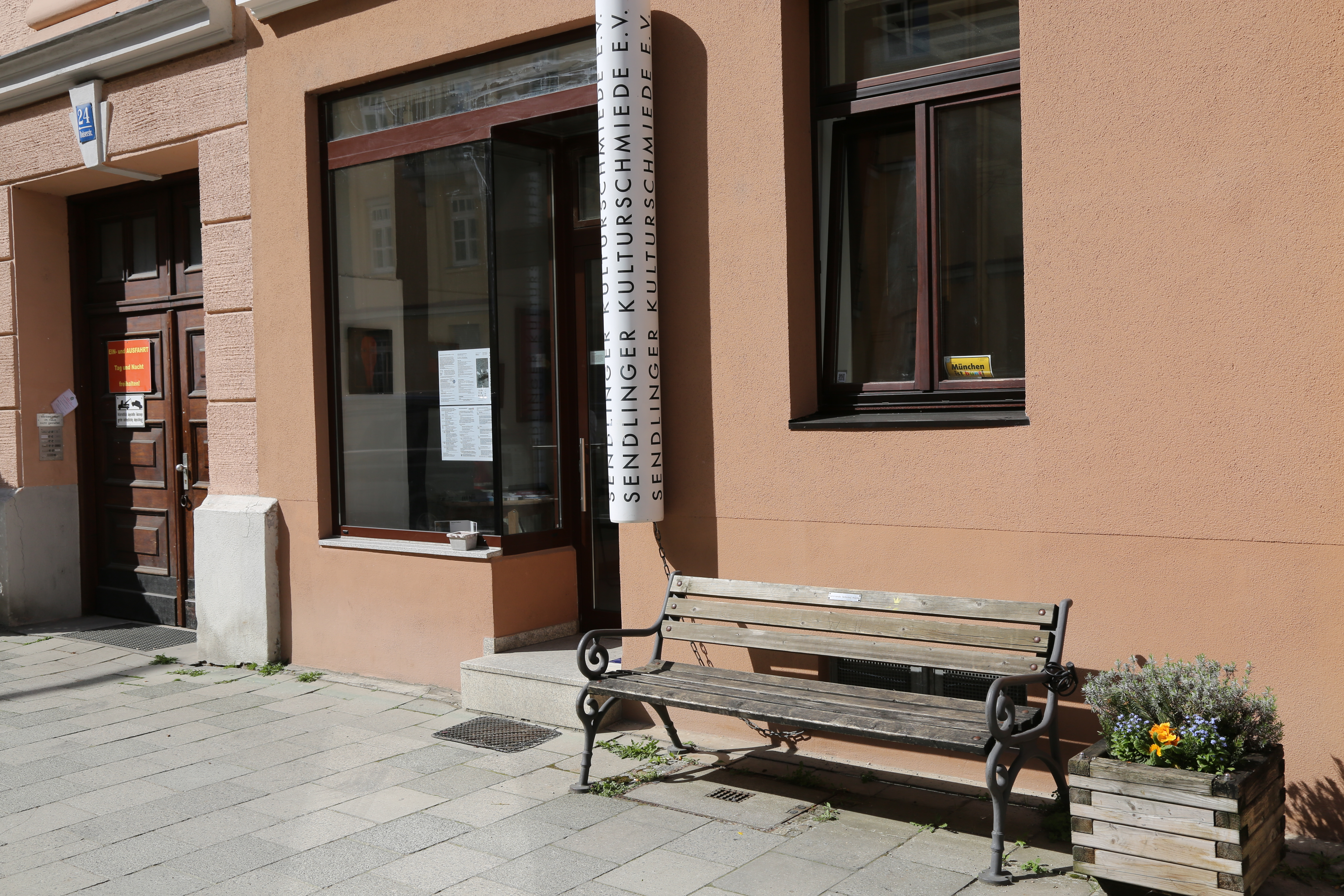 Sendlinger Kulturschmiede, Daiserstraße, München